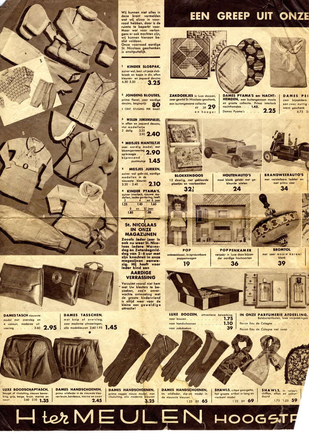 Aankondiging van Ter Meulen. Het sinterklaasfeest kan doorgaan. Ook al is er geen benzine en zijn de paarden gevorderd. Het assortiment is rijk en er is voor ieder wat wils.